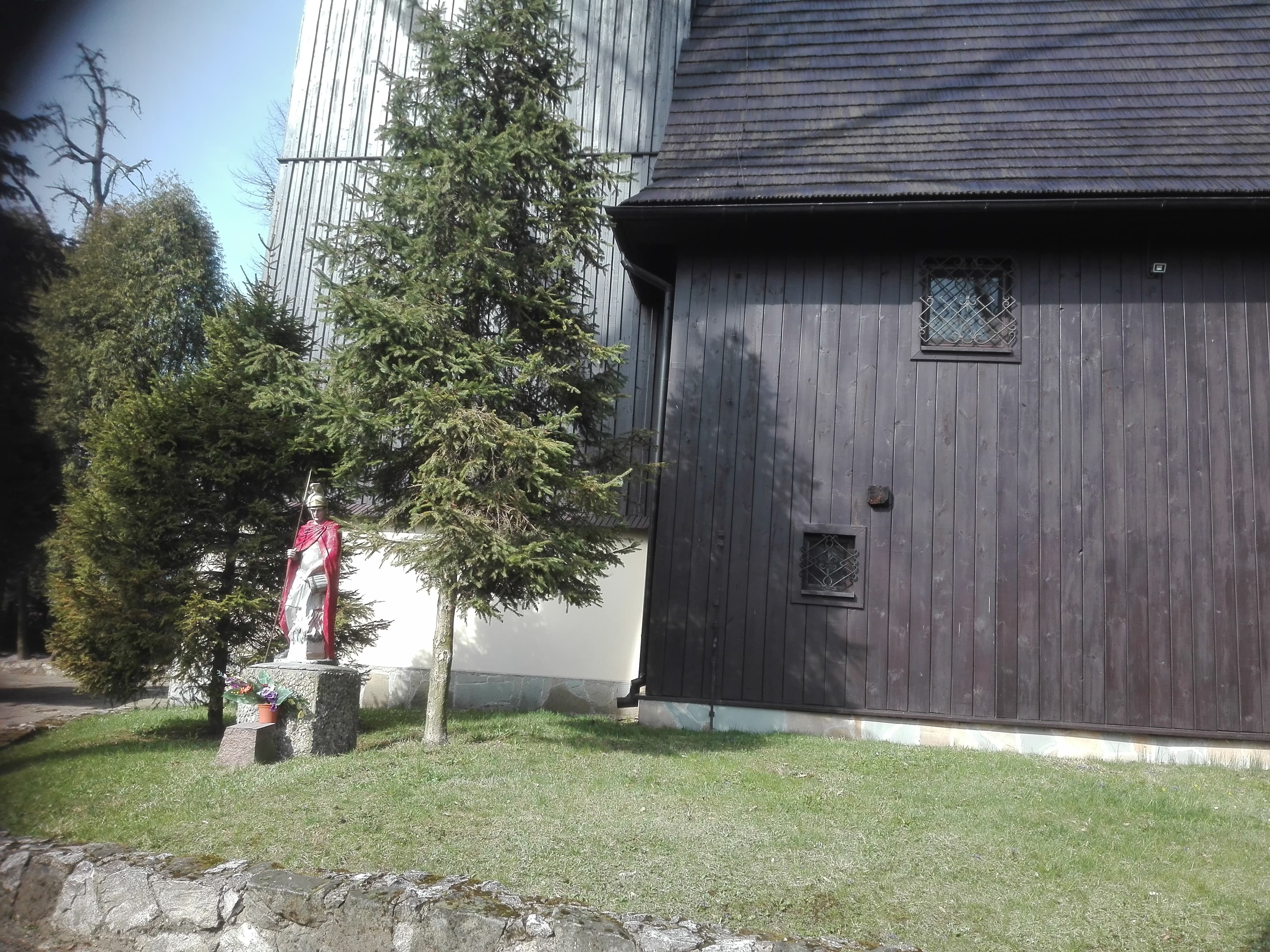 Kościół drewniany w Bąkowie